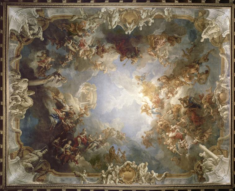 Apothèse d’Hercuele Château de Versailles Salon d'Hercule-plafond